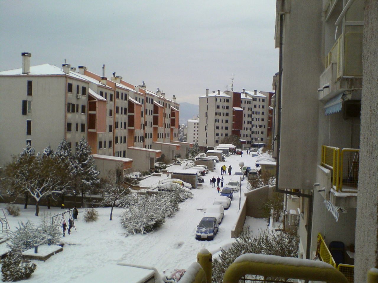 Snowy Rijeka - Krnjevo